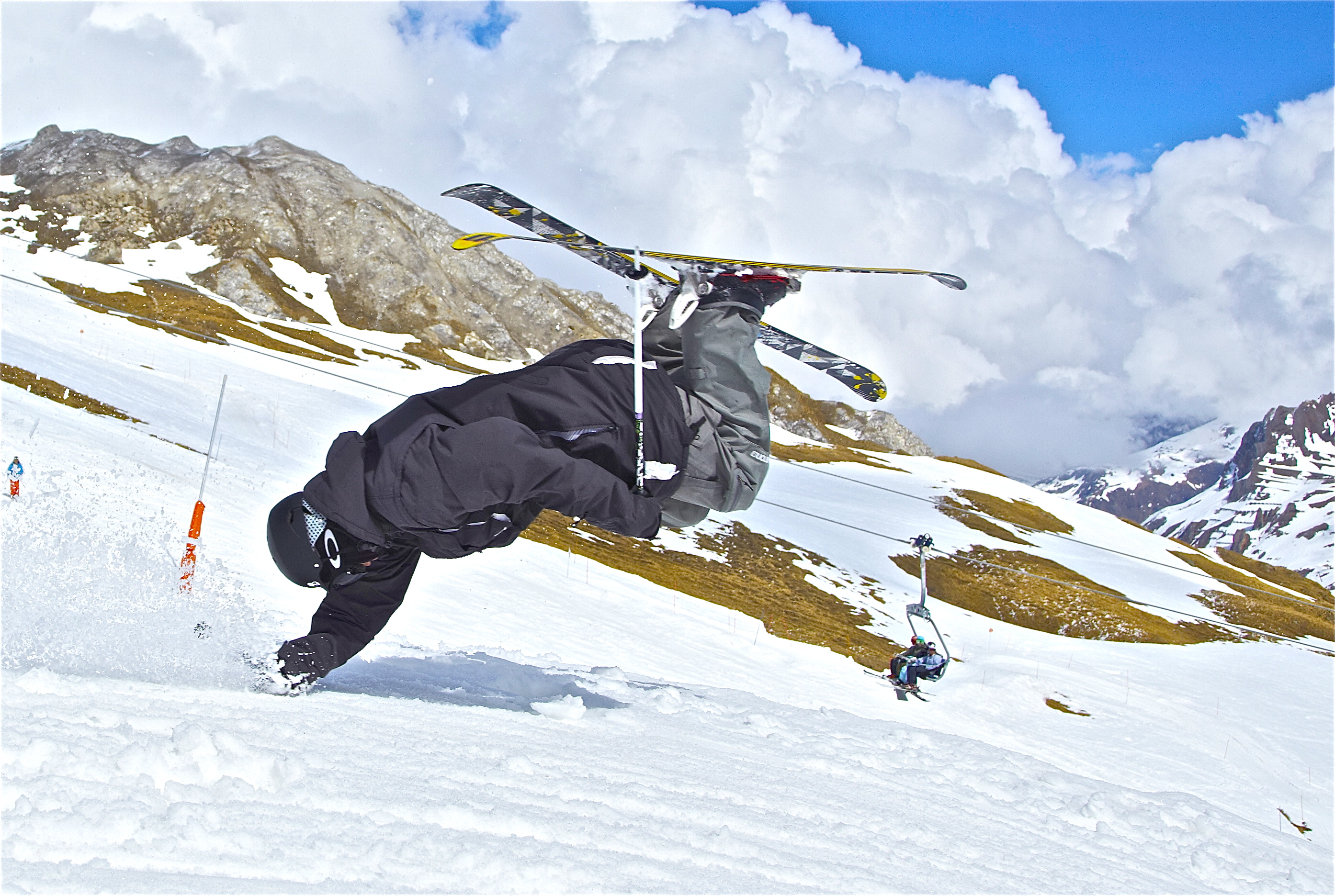 billedet er fanget af mester fotografen Jesper Grønnemark